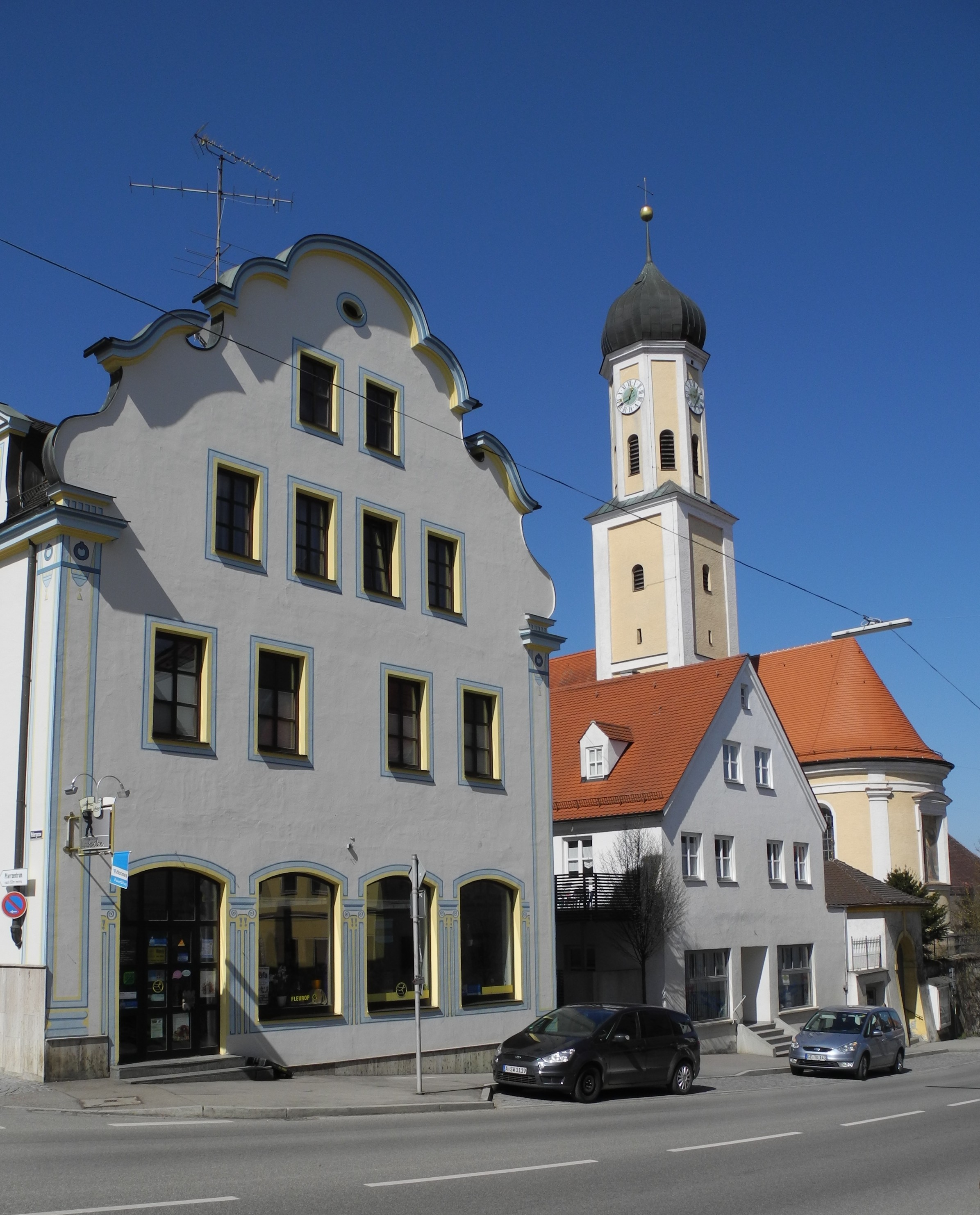 Zusmarshausen-Stadtzentrum mit Kirche